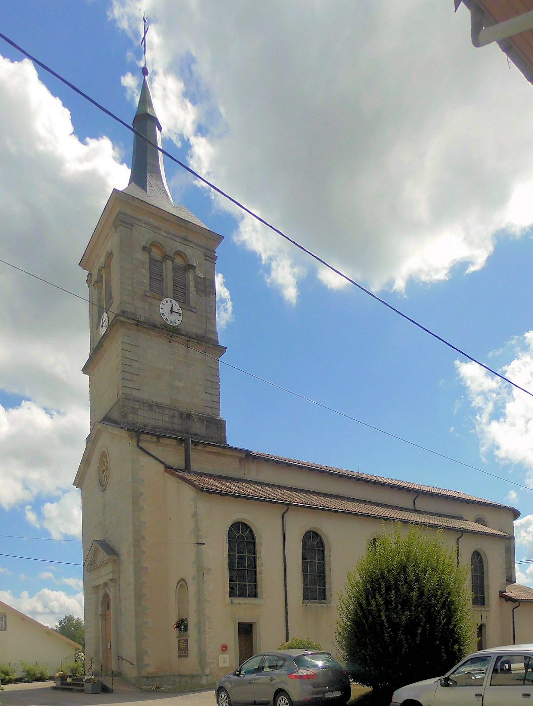 L'église Saint-Léger d'Archettes, côté ouest